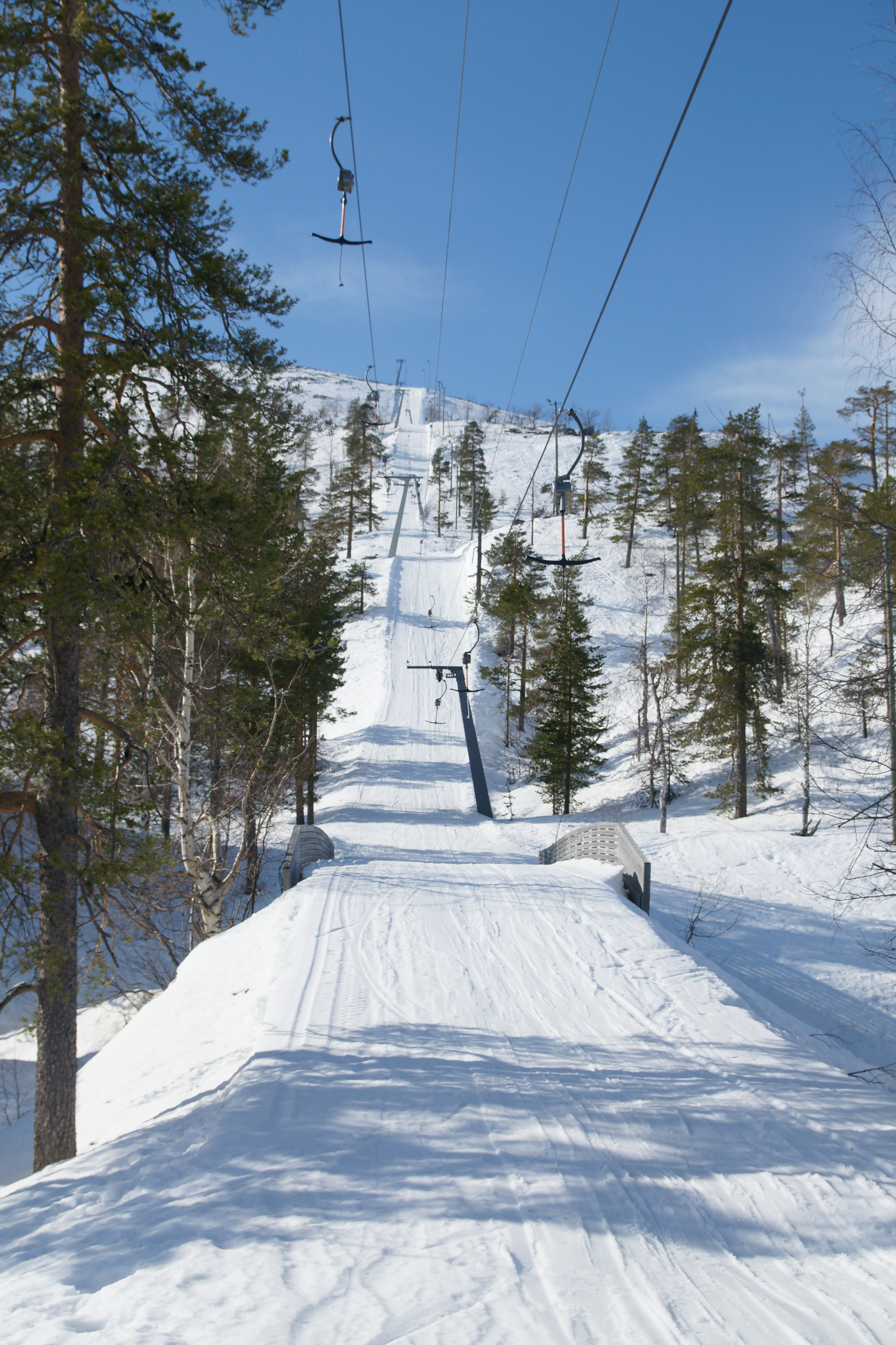 Hiihtohissi Pyhätunturilla.